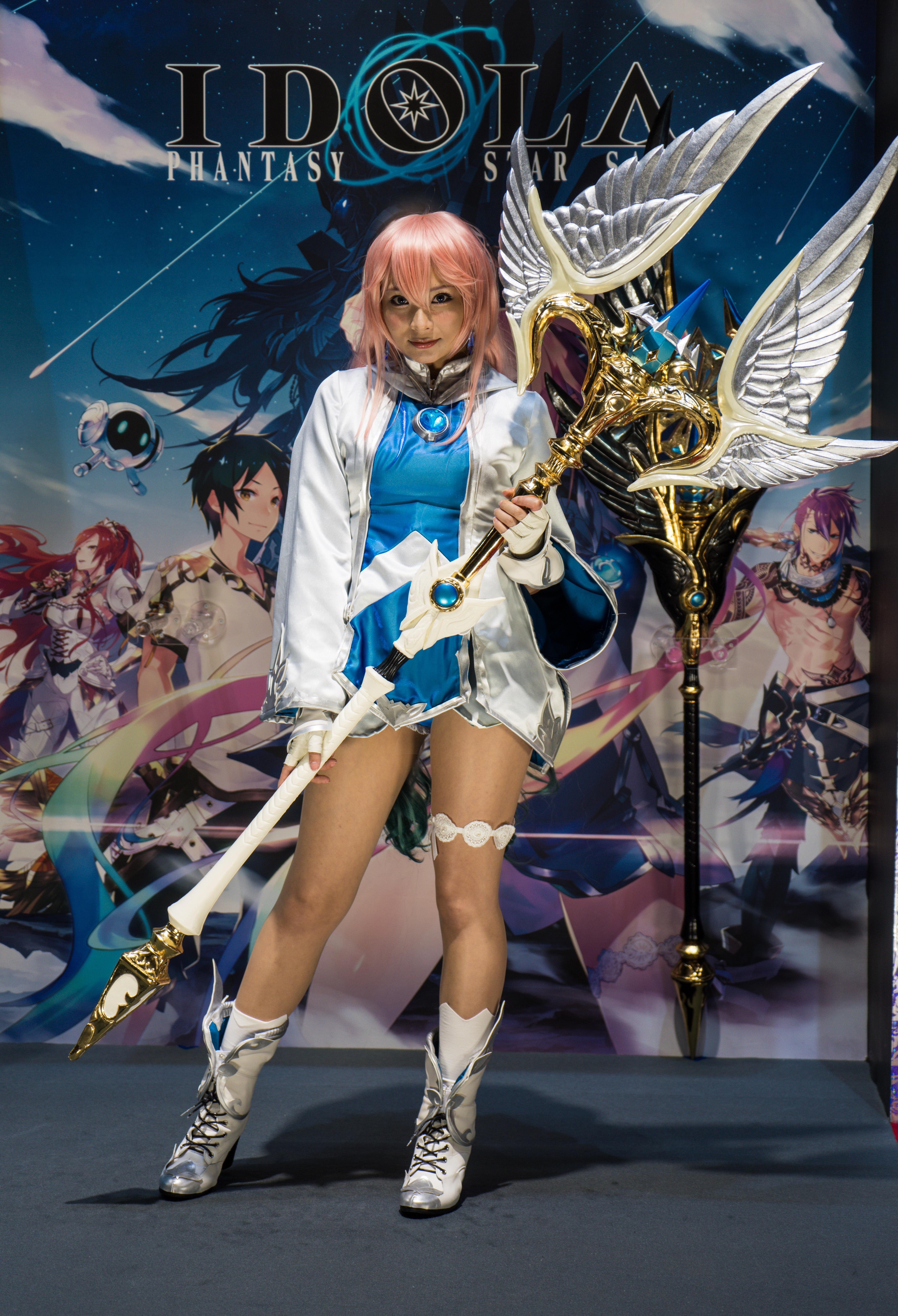 Tokyo Game Show 2018 (TGS)